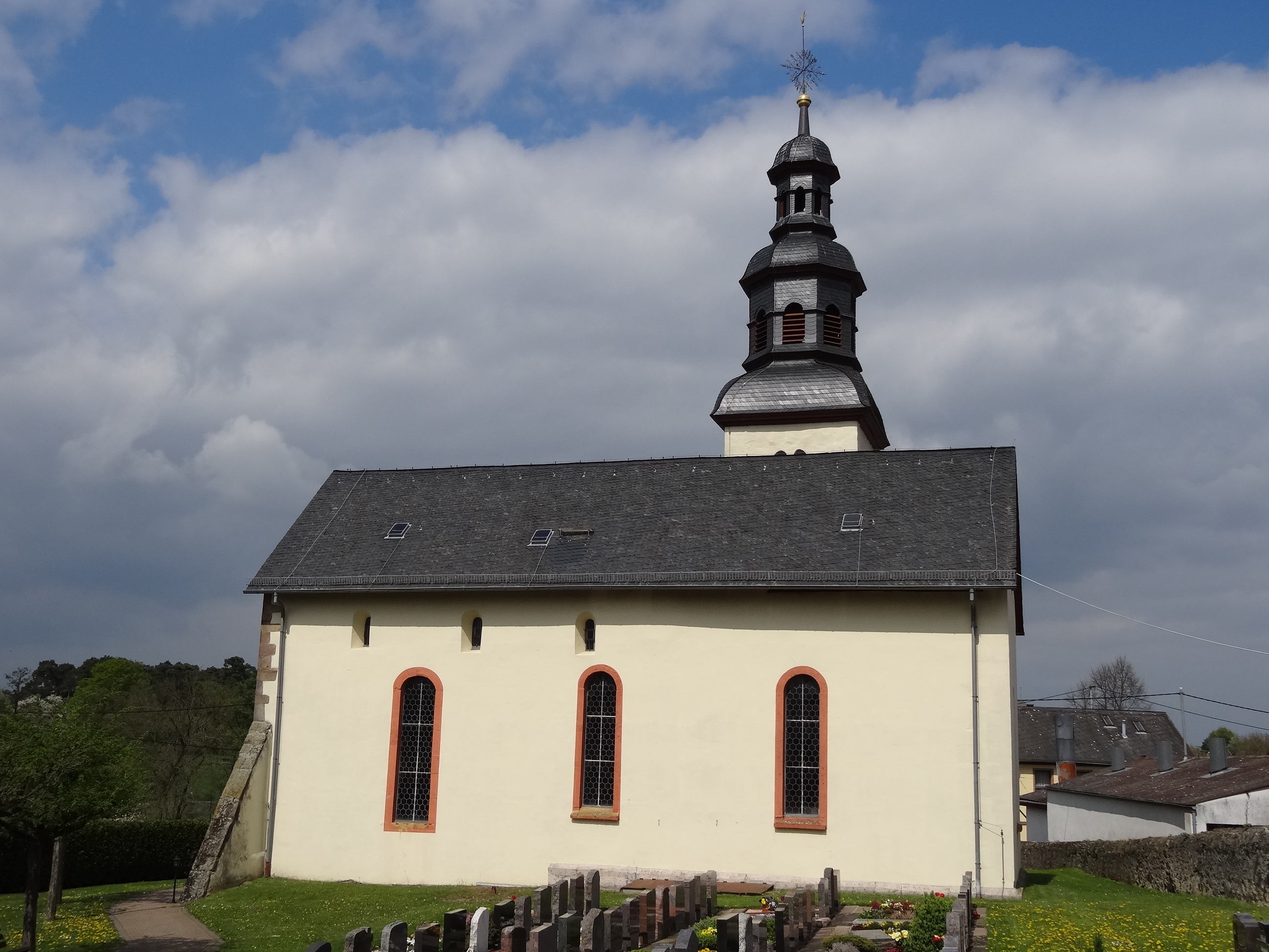 Evangelische Pfarrkirche Trais-Münzenberg